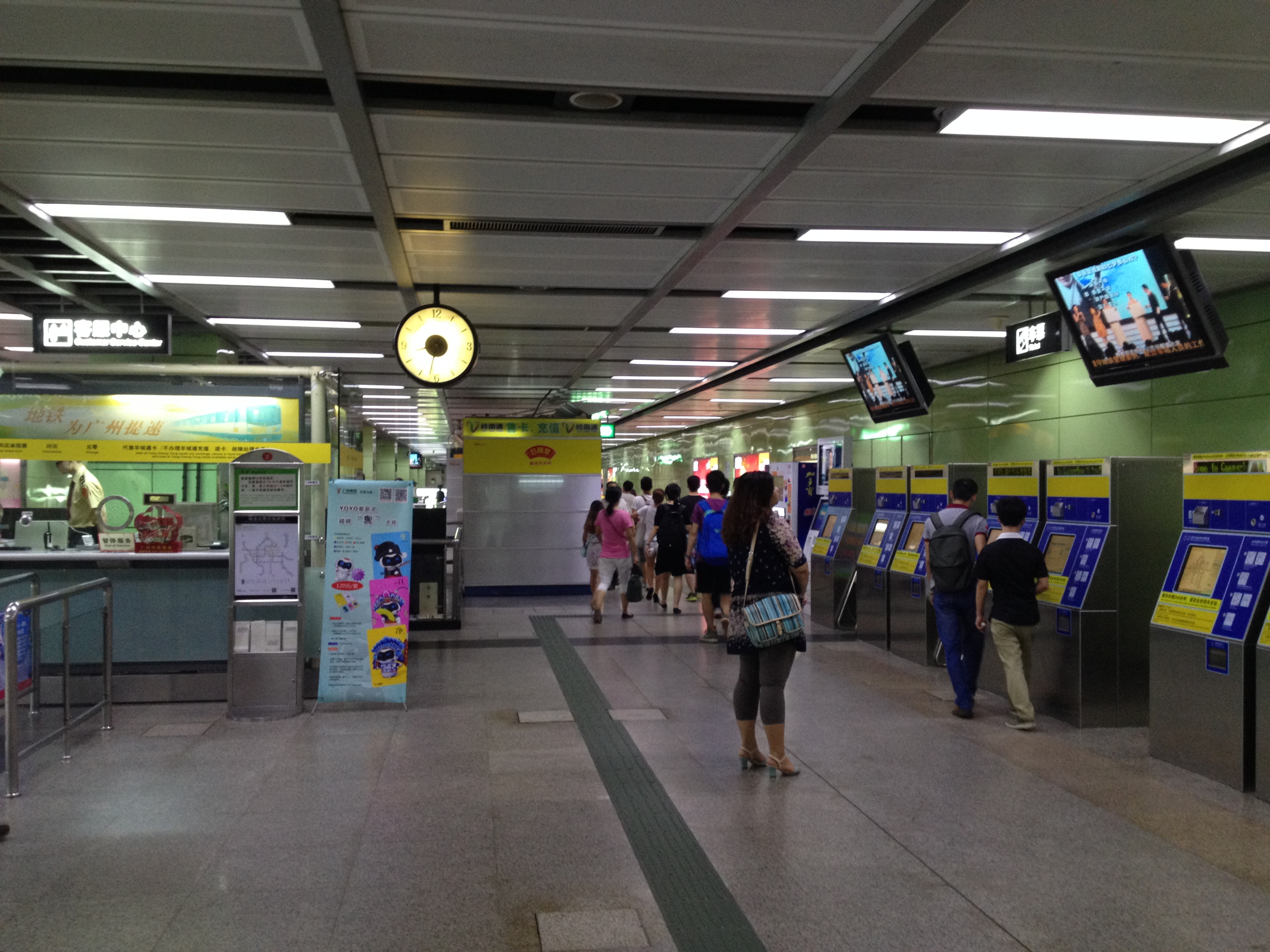 广州地铁晓港站站厅